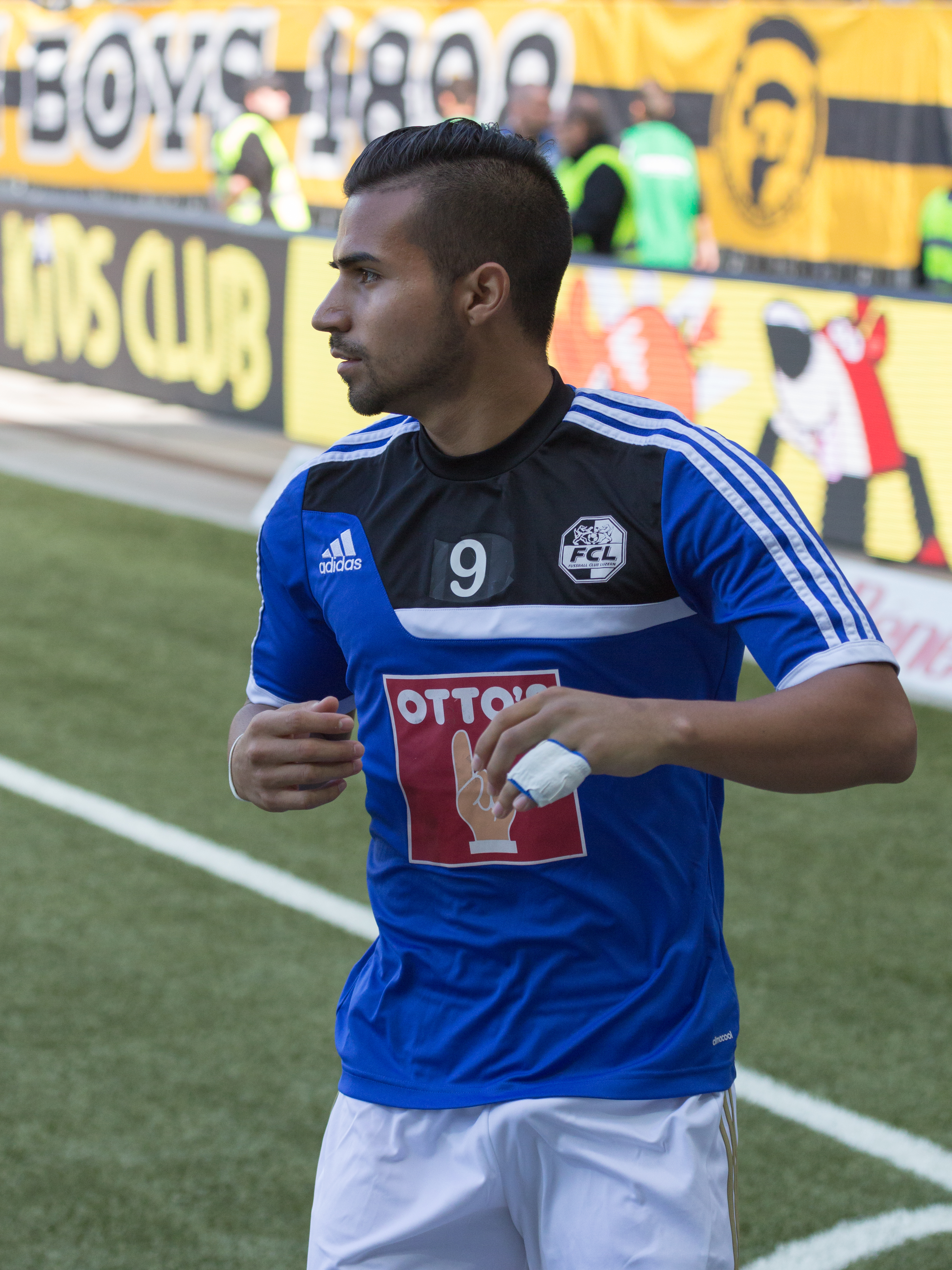 Bryan Rabello beim Spiel des BSC Young Boys gegen den FC Luzern